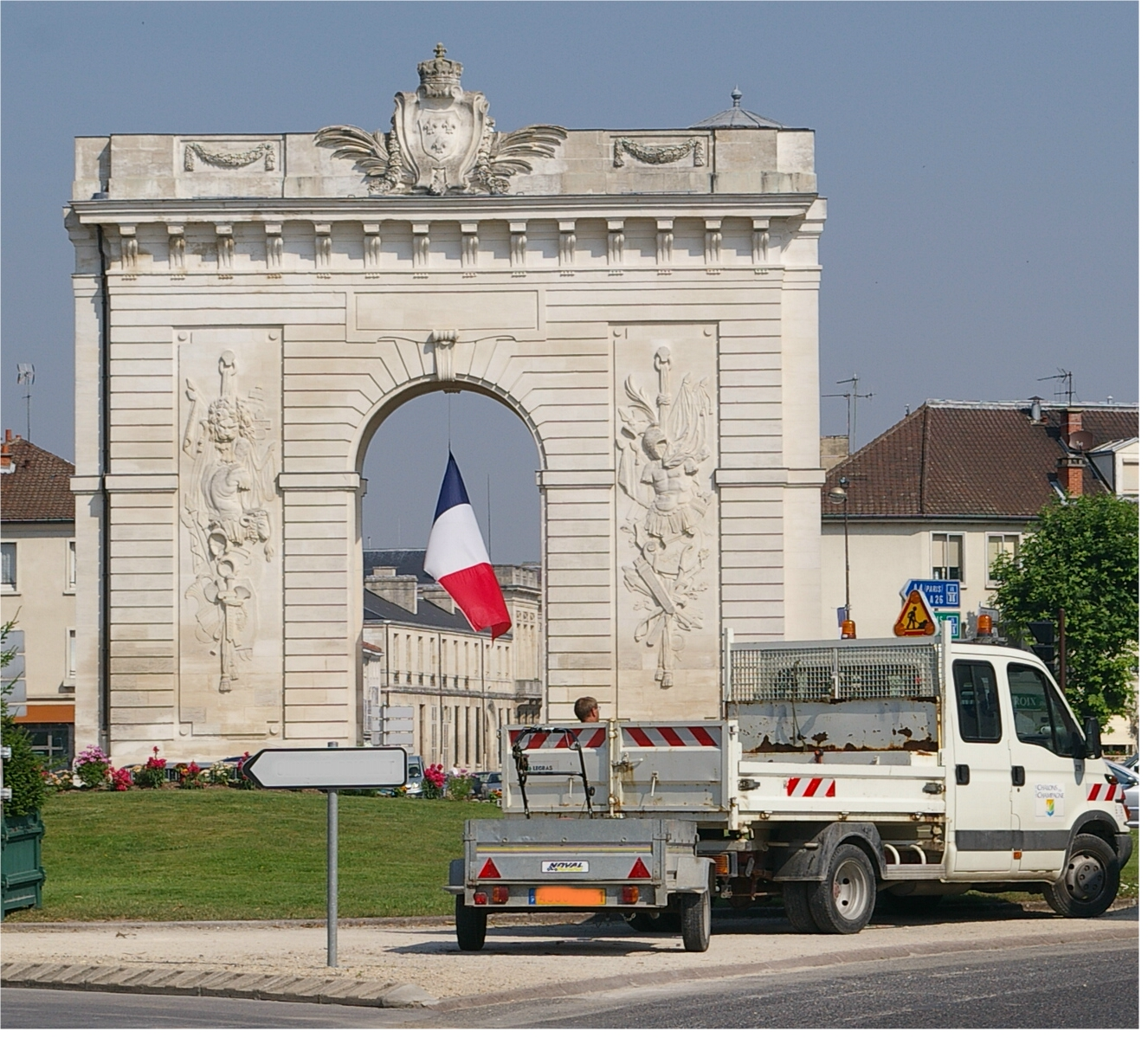 Arc de Triomphe in Chalons-sur-Champagne, zur Erinnerung an die Durchreise der künftigen Königin Marie-Antoinette, die von Wien durch Chalons nach Paris reiste, um Louis XVI zu heiraten